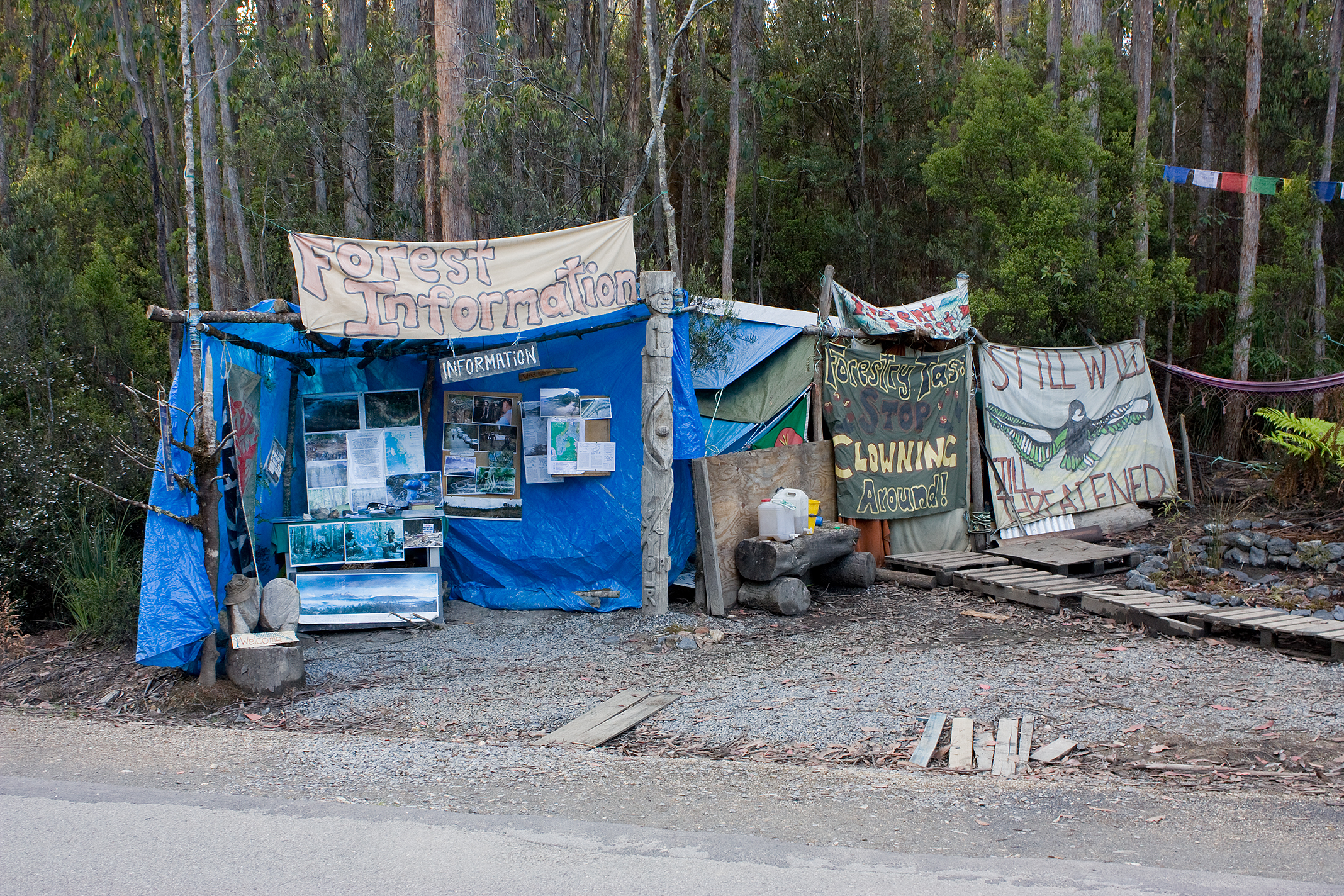 Upper Florentine Protest Camp